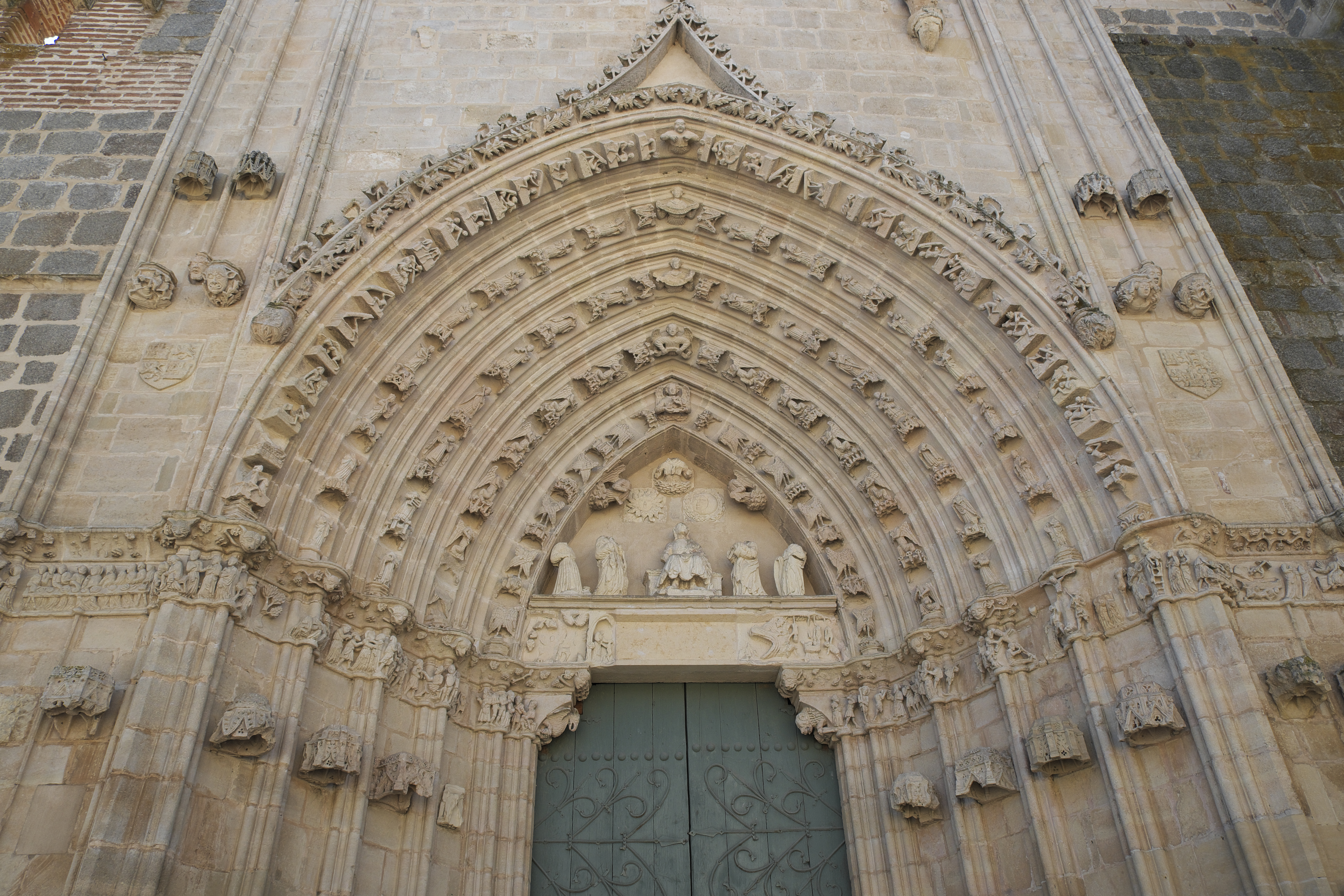 Katholische Pfarrkirche Nuestra Señora de la Soterraña, Kirche des ehemaligen Dominikanerklosters in Santa María la Real de Nieva in der Provinz Segovia (Kastilien-León/Spanien), Nordportal aus der 1. Hälfte des 15. Jahrhunderts